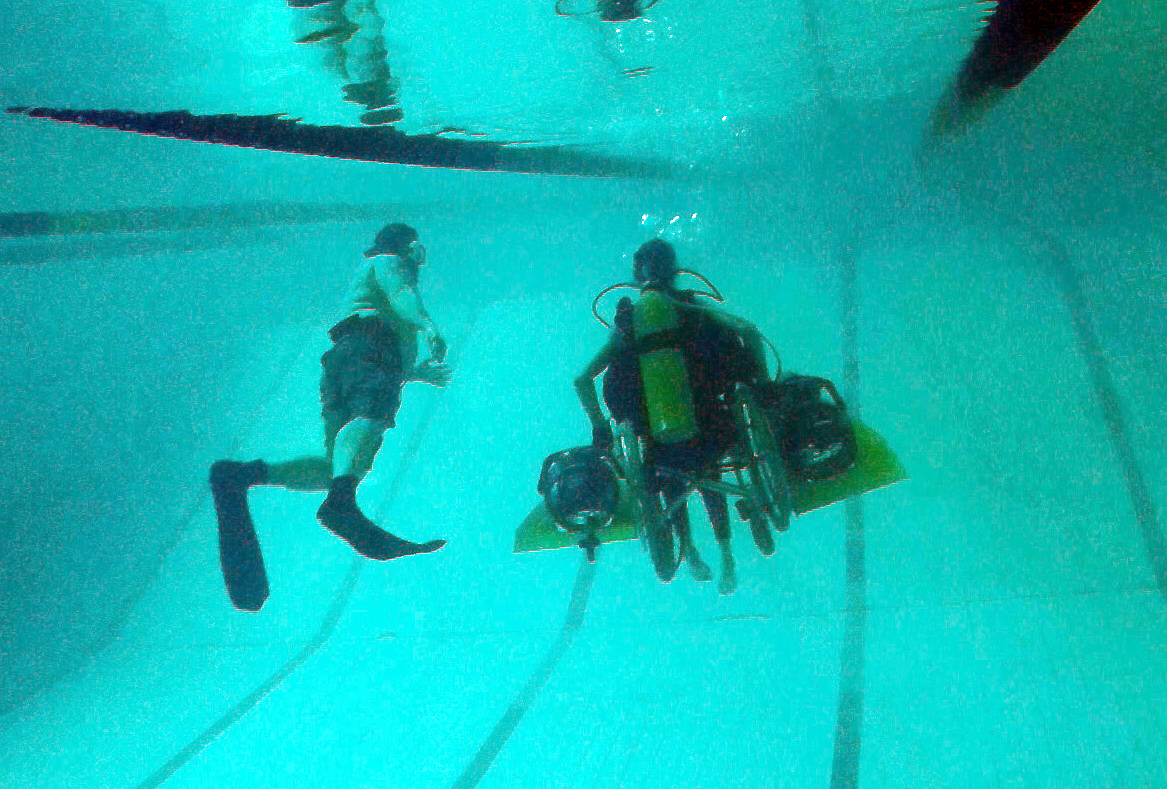 Испытание первой в мире самоходной подводной инвалидной коляски Скикевича